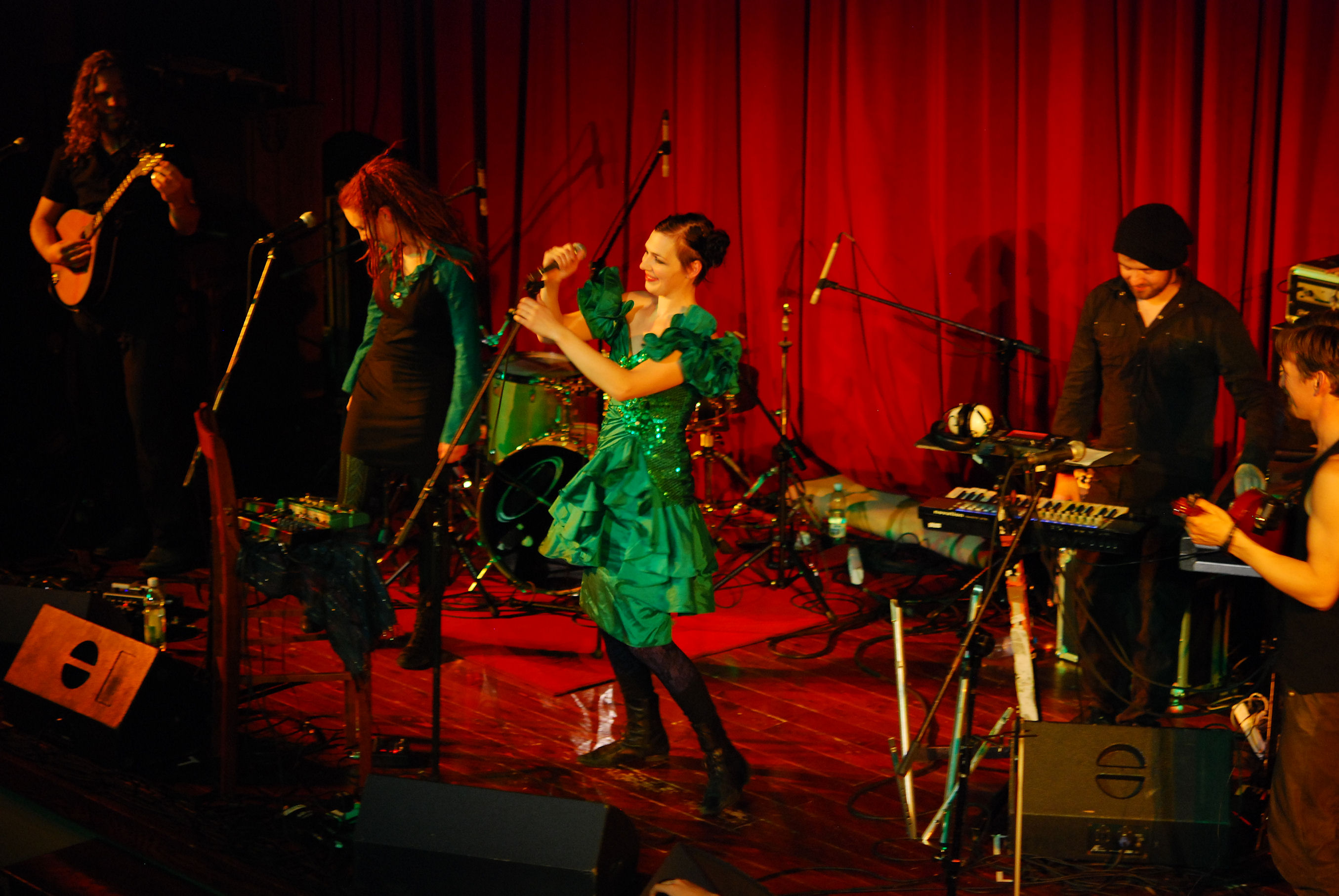 Valravn podczas Festivalu Ars Cameralis 2009 "Wieczór Muzyki Folkowej" w Kinoteatr "Rialto" w Katowicach 24.11.2009